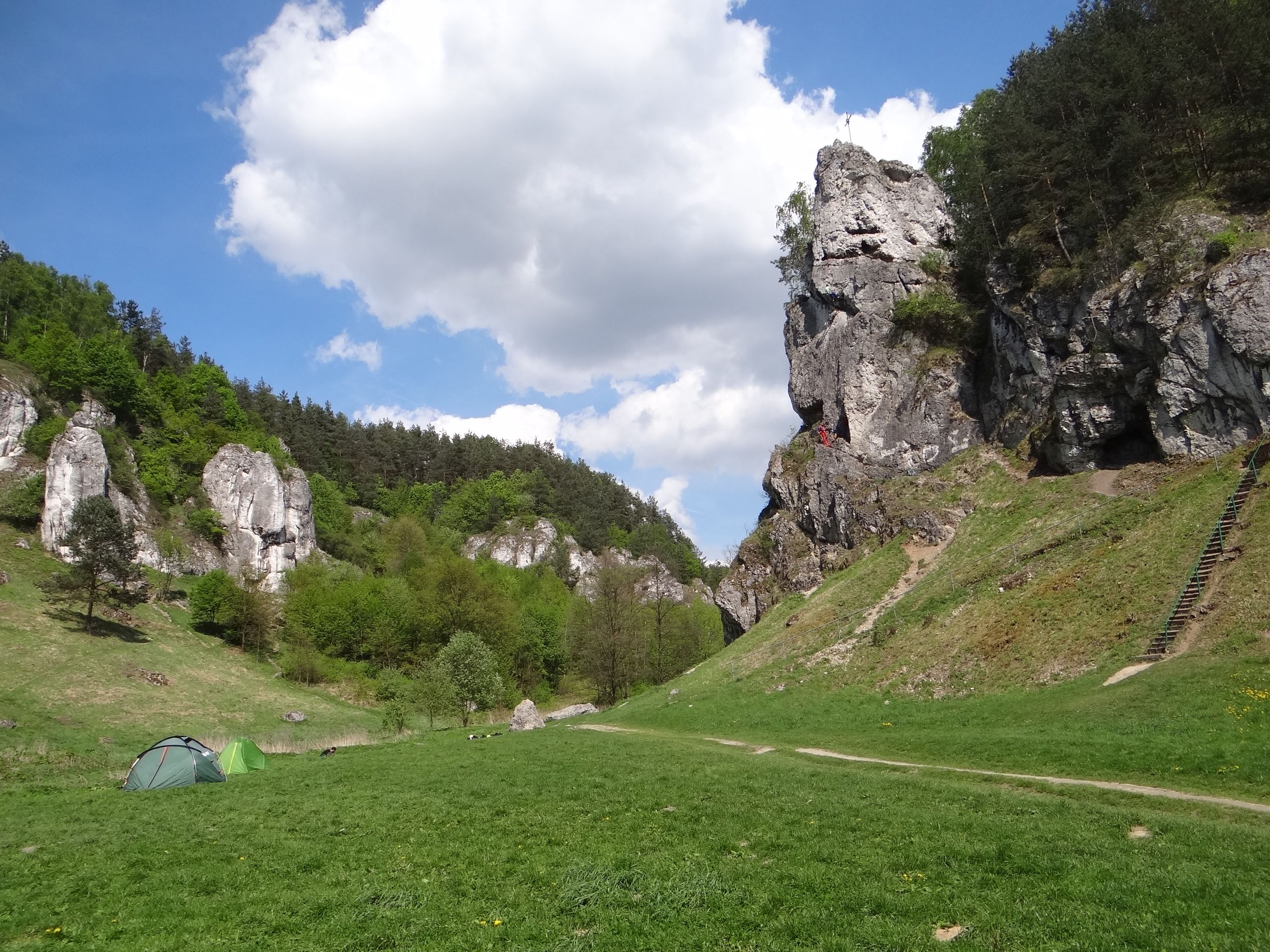 Dolina Kobylańska. Z prawej strony Żabi Koń